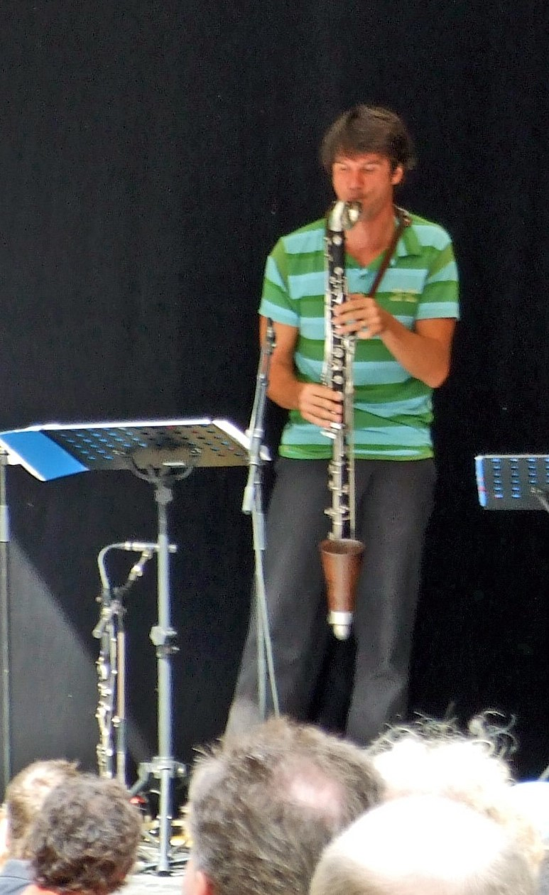 Claudio Puntin in Ffm, mit dem "Big Zoom" von Lucas Niggli